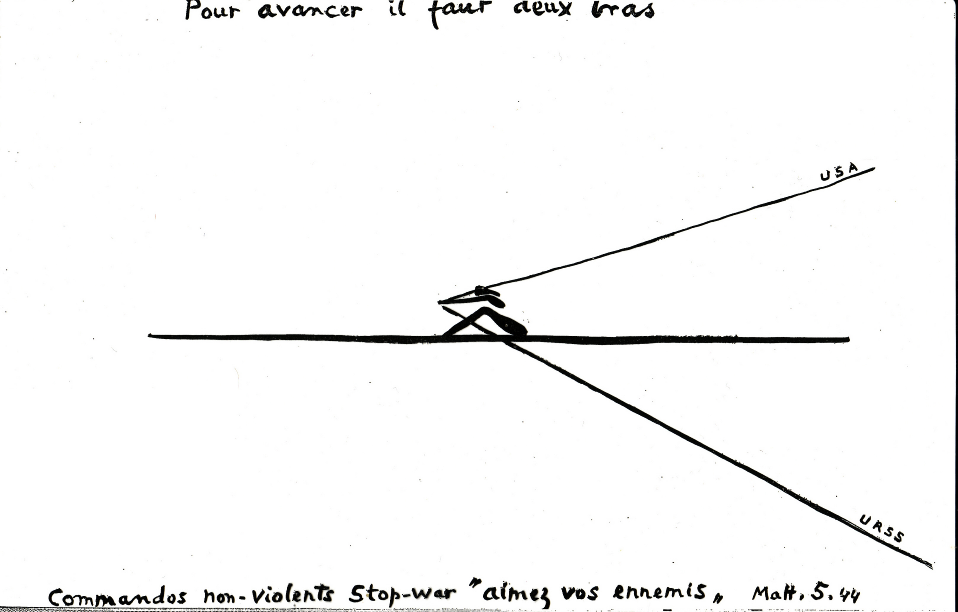 Croquis